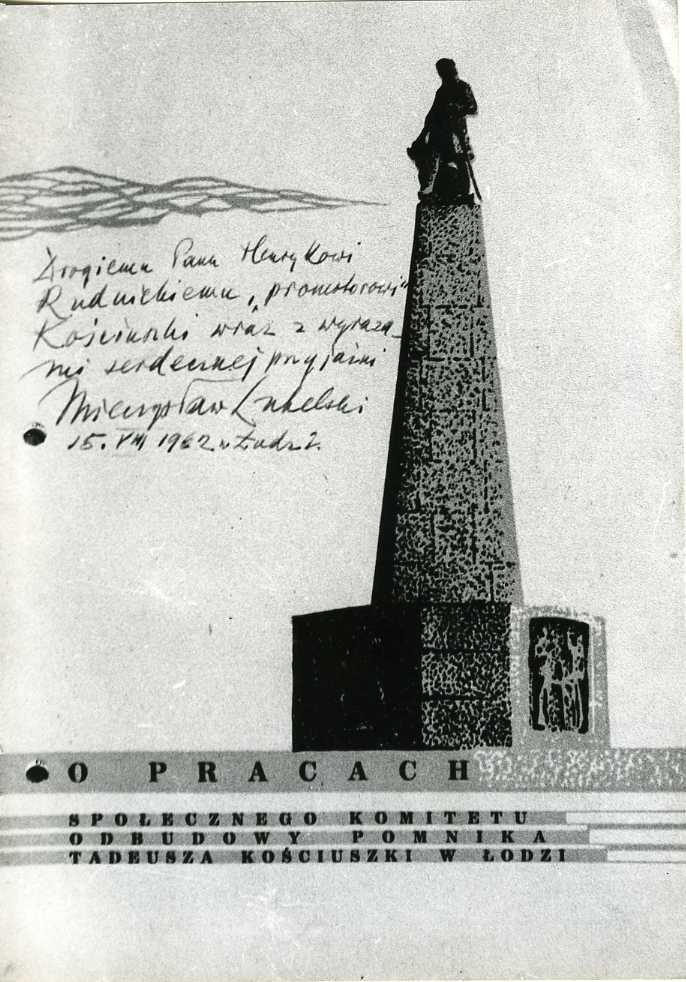 Fotokopia dedykacji rzeźbiarza Mieczysława Lubelskiego dla Henryka Rudnickiego z którym współdziałał przy odbudowie pomnika T. Kościuszki w Łodzi. 15 sierpnia 1962 roku.